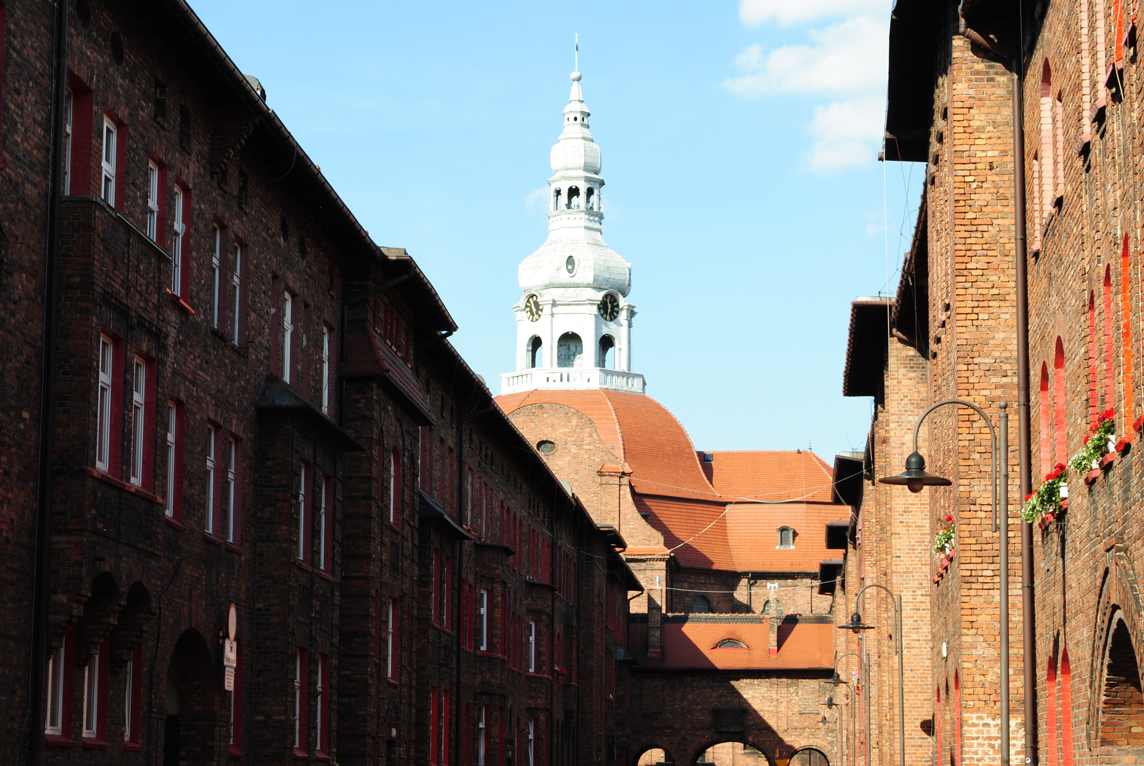 Katowice - Janów-Nikiszowiec. Ul. Św. Anny. W tle kościół św. Anny